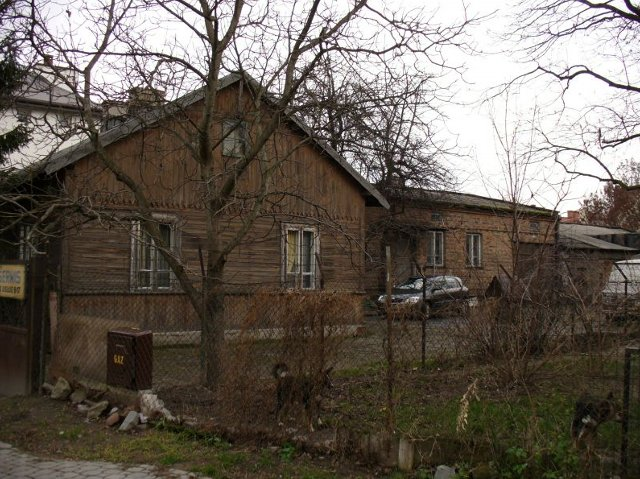 Pozostałości dawnej zabudowy wsi Wolica.